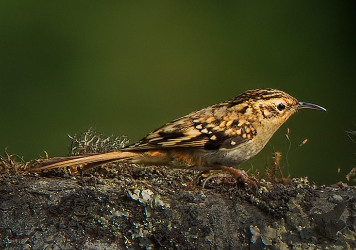 Certhia nipalensis, Blyth, 1845